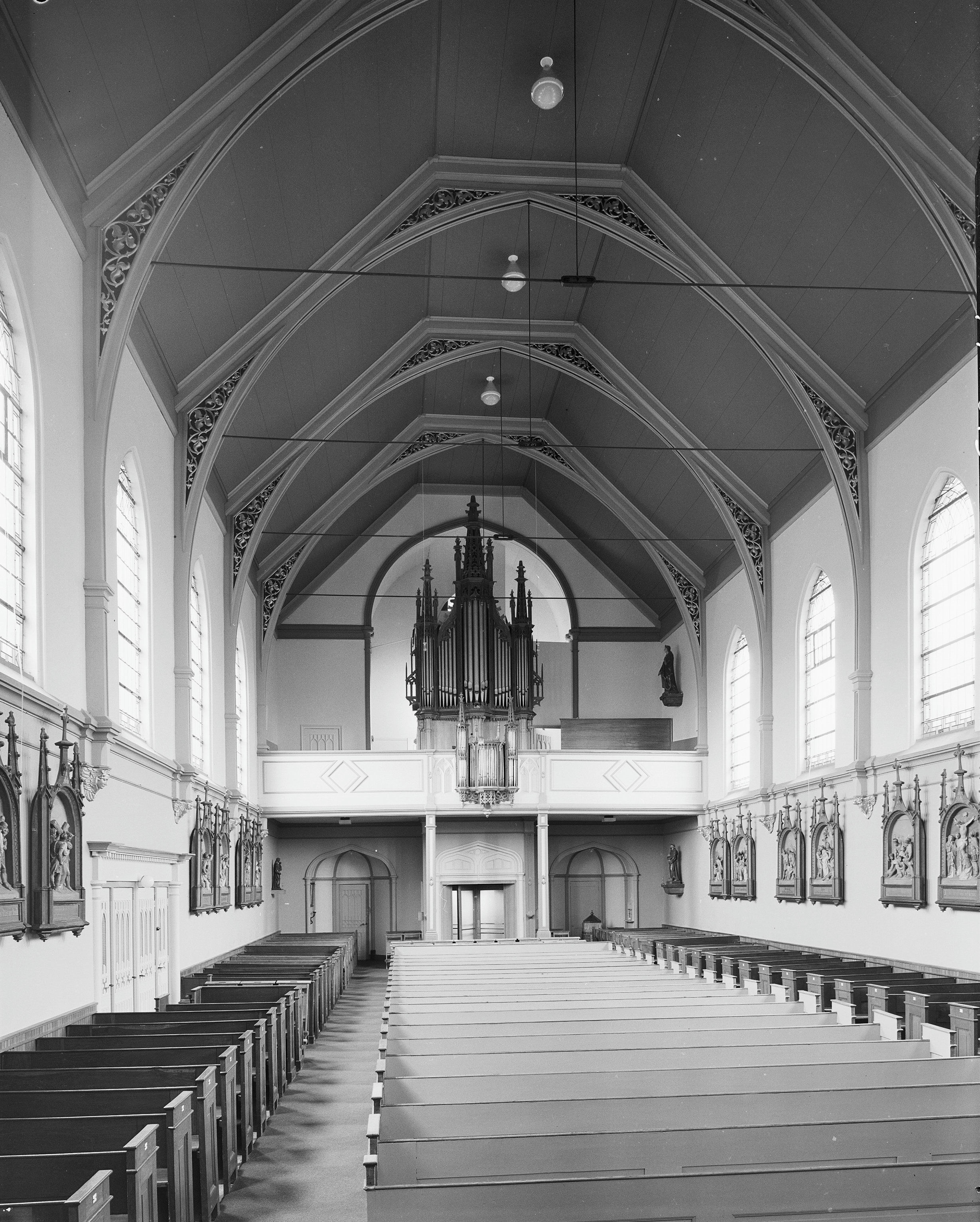 Rooms-Katholieke kerk: Interieur naar het orgel